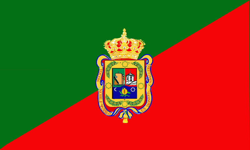 Bandera de Tocón, en el municipio de Íllora (Granada, España)